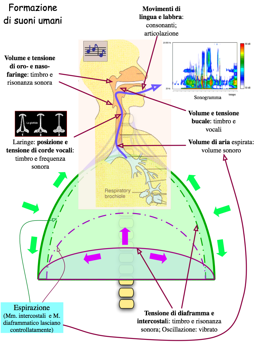 Grafica: Medicina: Respirazione: Formazione di suoni umani: Grafica: Medicina: Apparato respiratorio: Anatomia, fisiologia: movimenti, volume, tensione, posizione: lingua, labbra, faringe, corde vocali, bocca, diaframma, muscoli intercostali: espirazione: vocali, consonanti, articolazione, volume, frequenza, timbro, risonanza